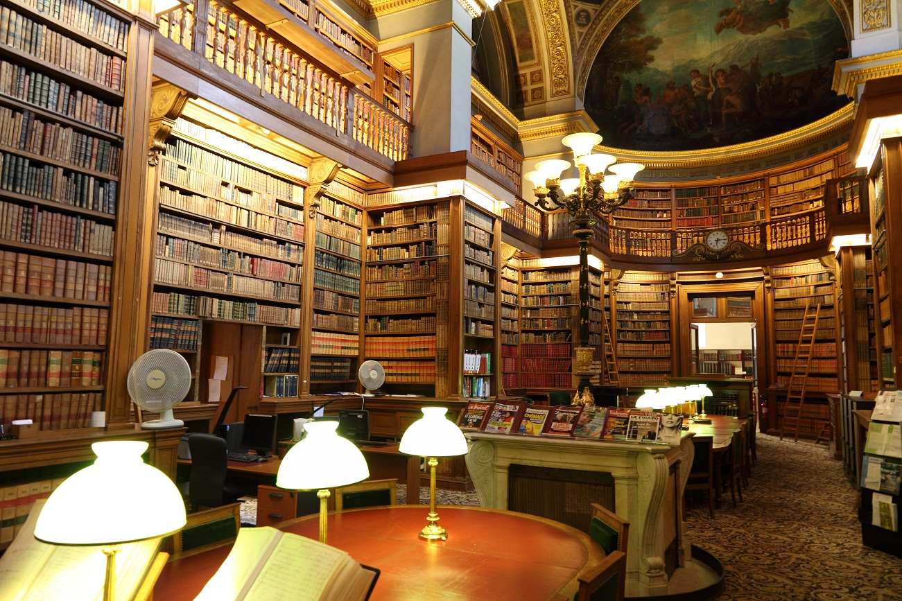 La bibliothèque de l'Assemblée Nationale en septembre 2012, Île-de-France, France.